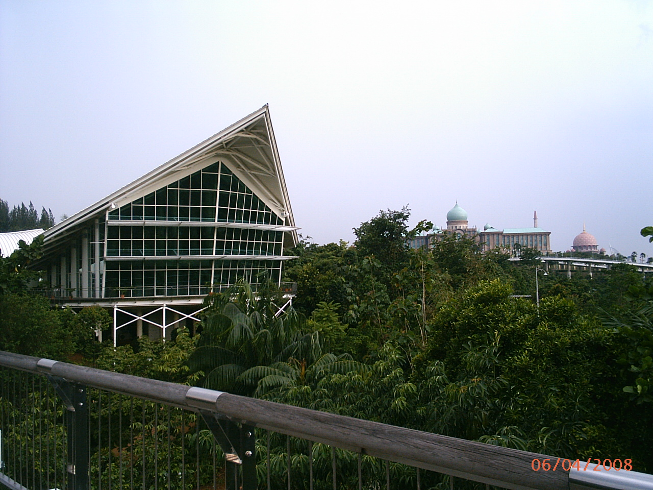 Pandangan dari jambatan kayu dalam Taman Botani. [L-R] Pejabat Taman Botani, Perdana Putra (Pejabat Perdana Menteri), Masjid Putrajaya